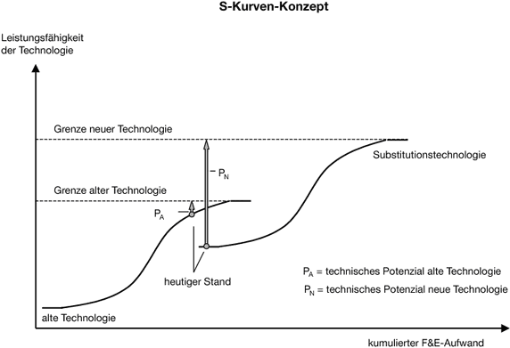 Potentiale und Grenzen des S-Kurven-Konzeptes